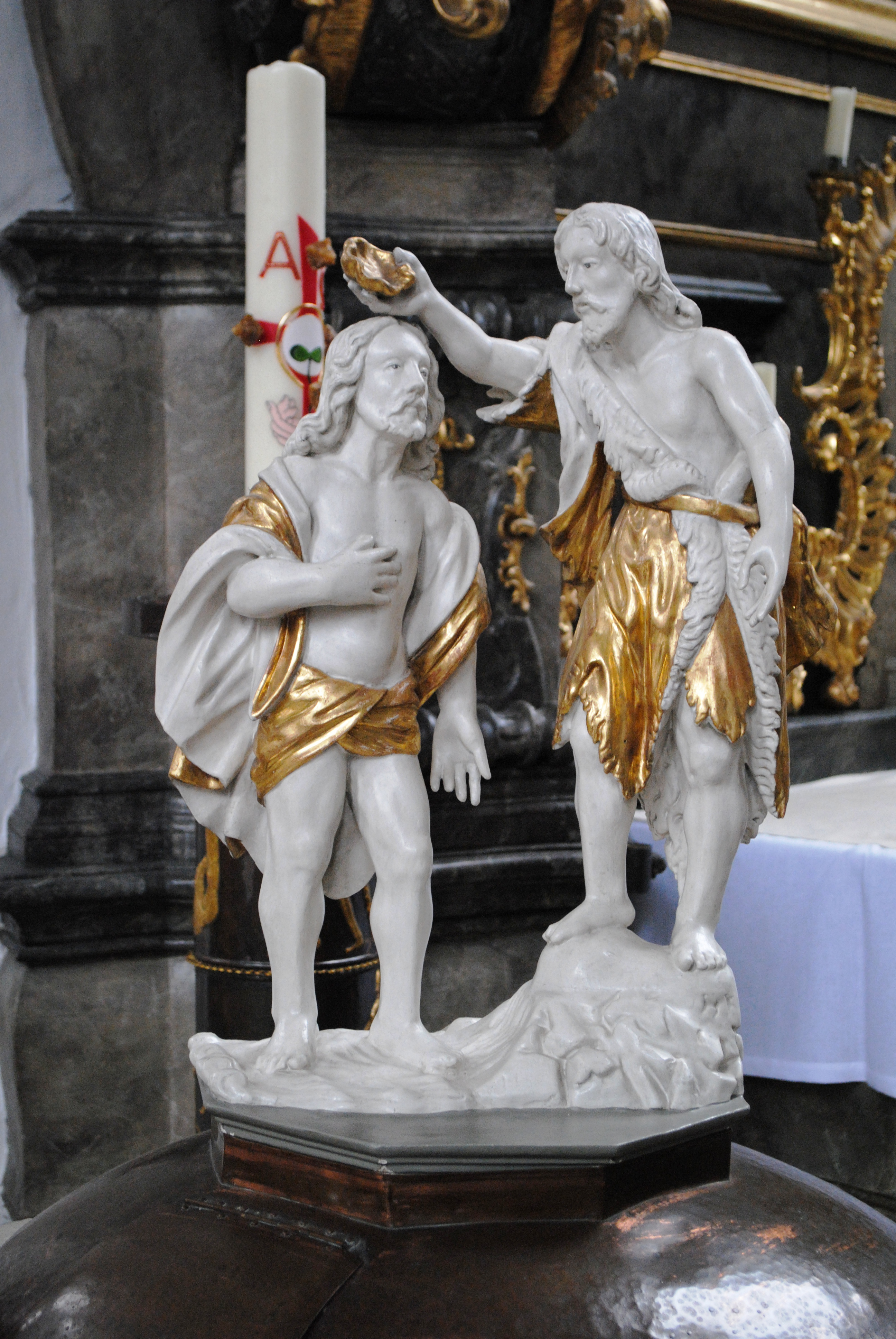 Figurengruppe, St. Bartholomäus, Volkach, Holz, um 1750.